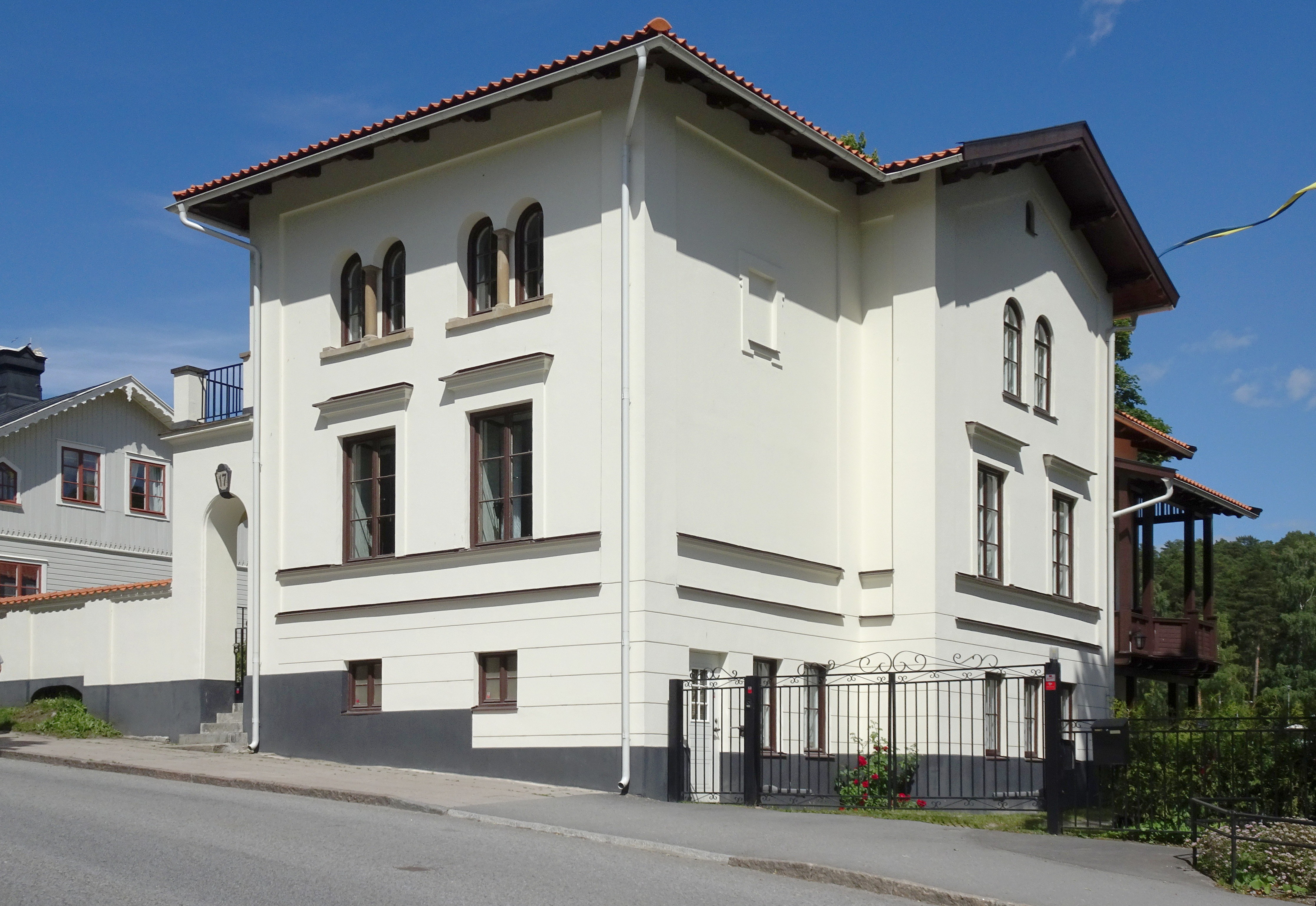 Vattumannen 2, Södertälje. Borgmästarvillan (även kallat Huset Ingenting), arkitekt Tore E:son Lindhberg